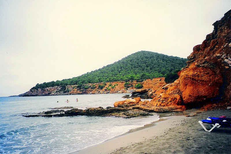 Tallserrat Davall es Puig des Jondal vist des de la platja del Bol Nou, prop de sa Caleta, a Eivissa